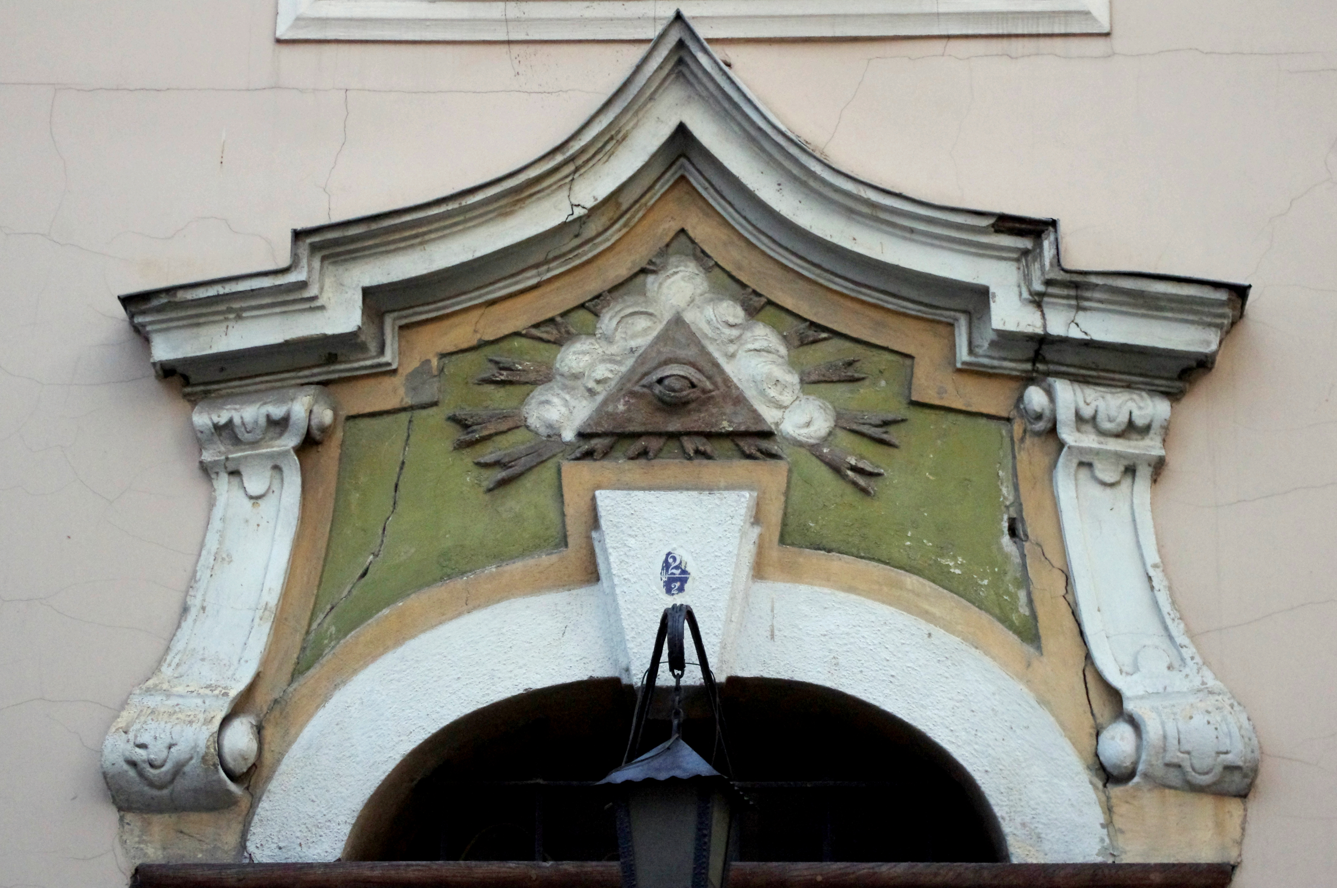 Pszczyna, dom, XVIII w., tzw. Kamienica pod okiem opatrzności.Detal nad drzwiami.